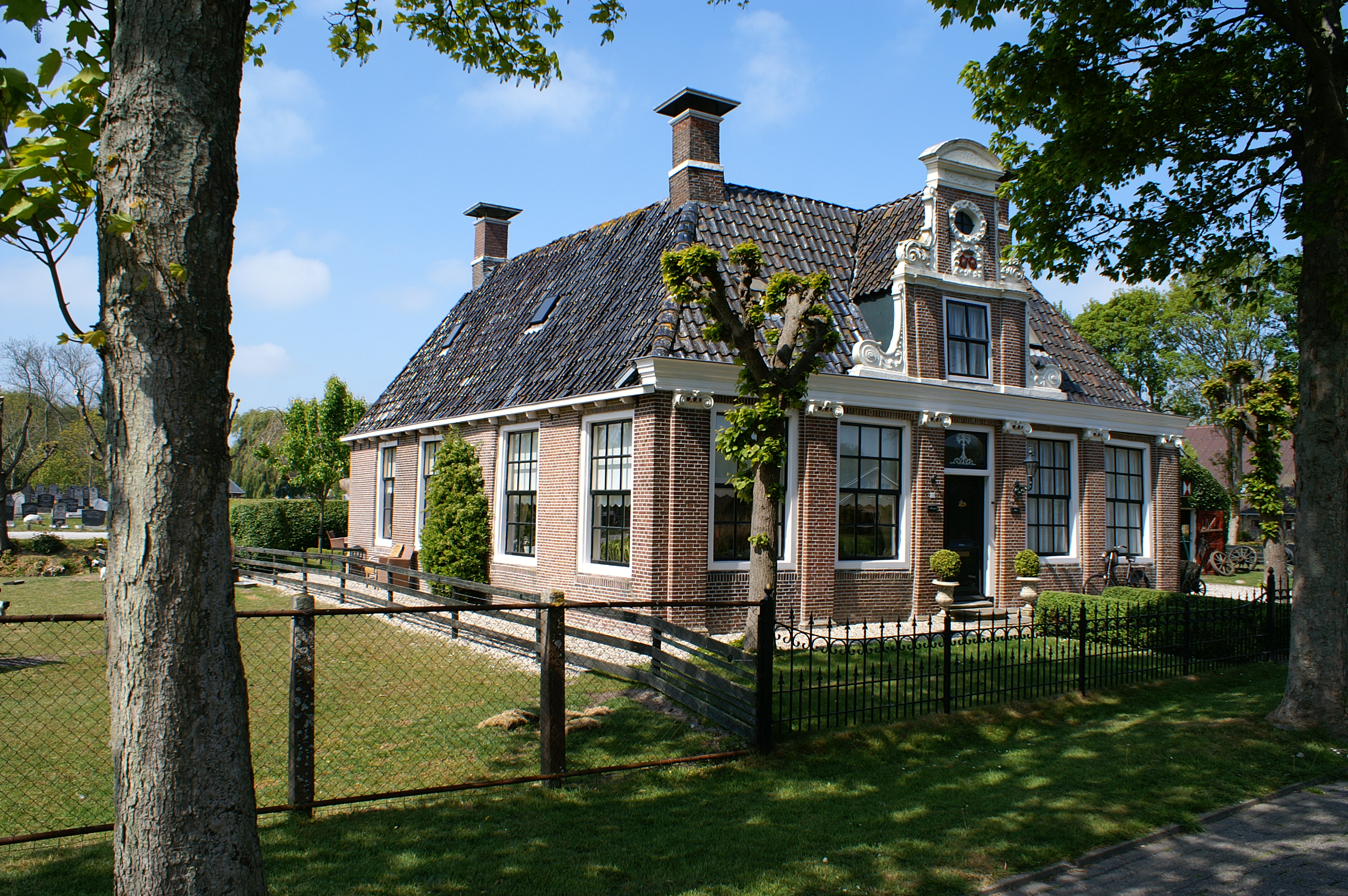 Monsma State te Bolsward.